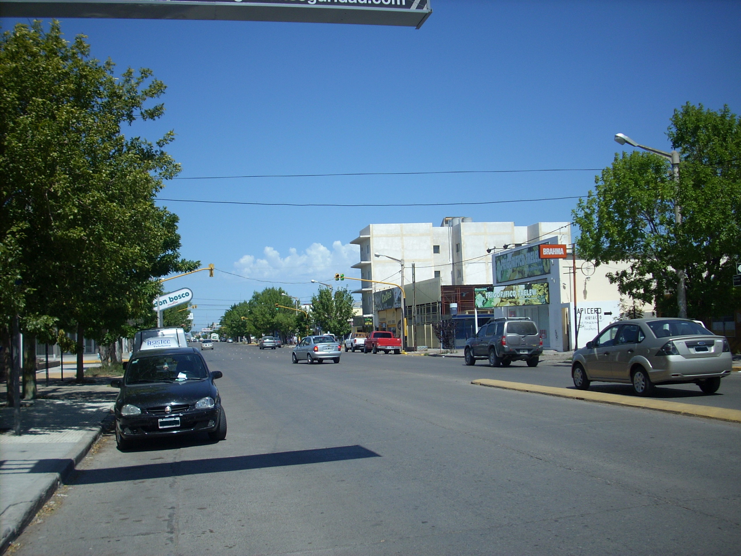 Vista de la Avenida Hipólito Yrigoyen en la ciudad de Trelew